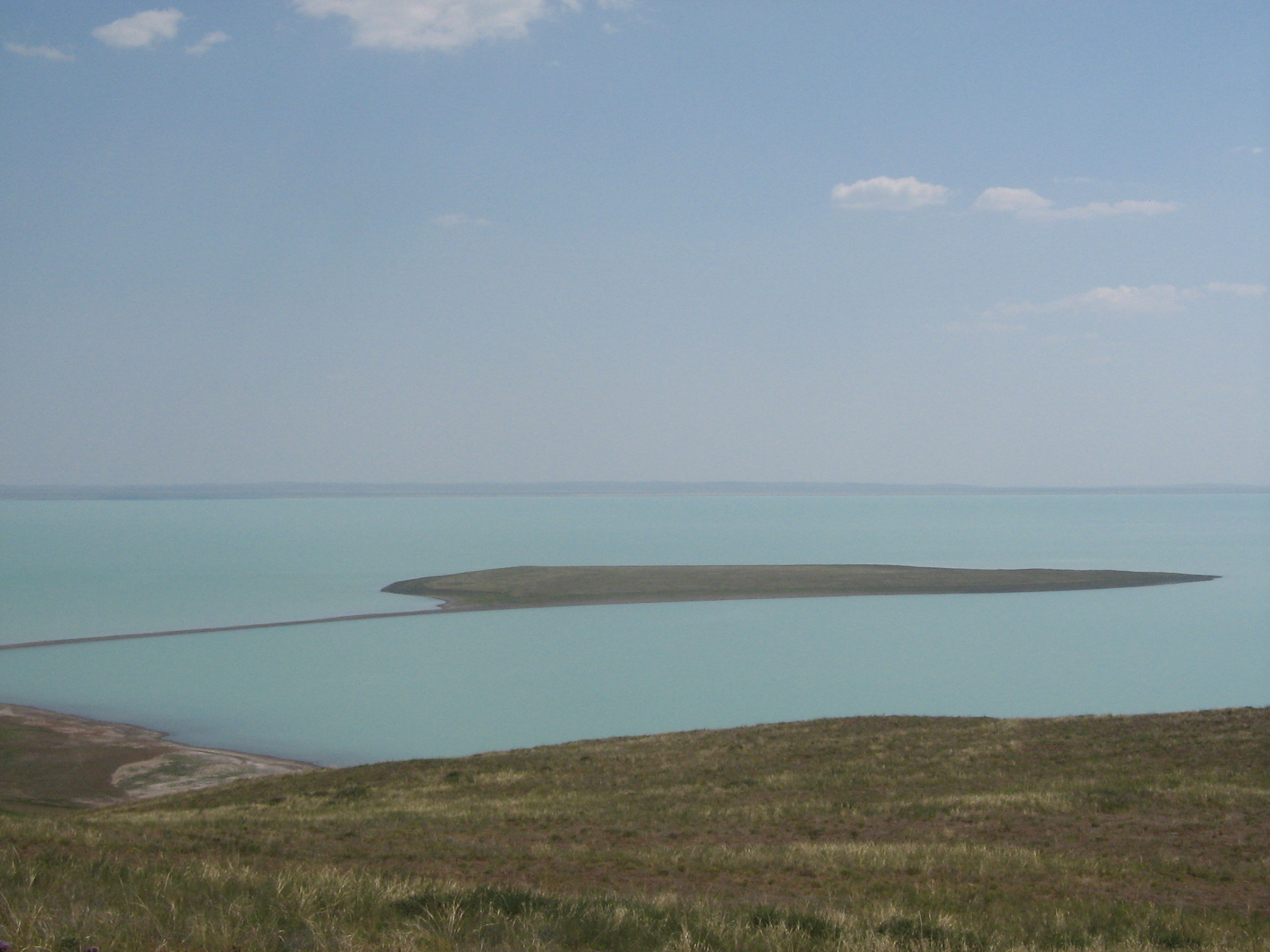 Озеро расположено на территории биосферного заповедника "Даурский" Озеро-соленое This image is related to the protected area of Russia number 7510020